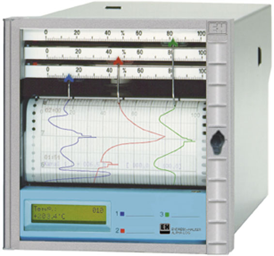 Farb-Hybridschreiber Alphalog